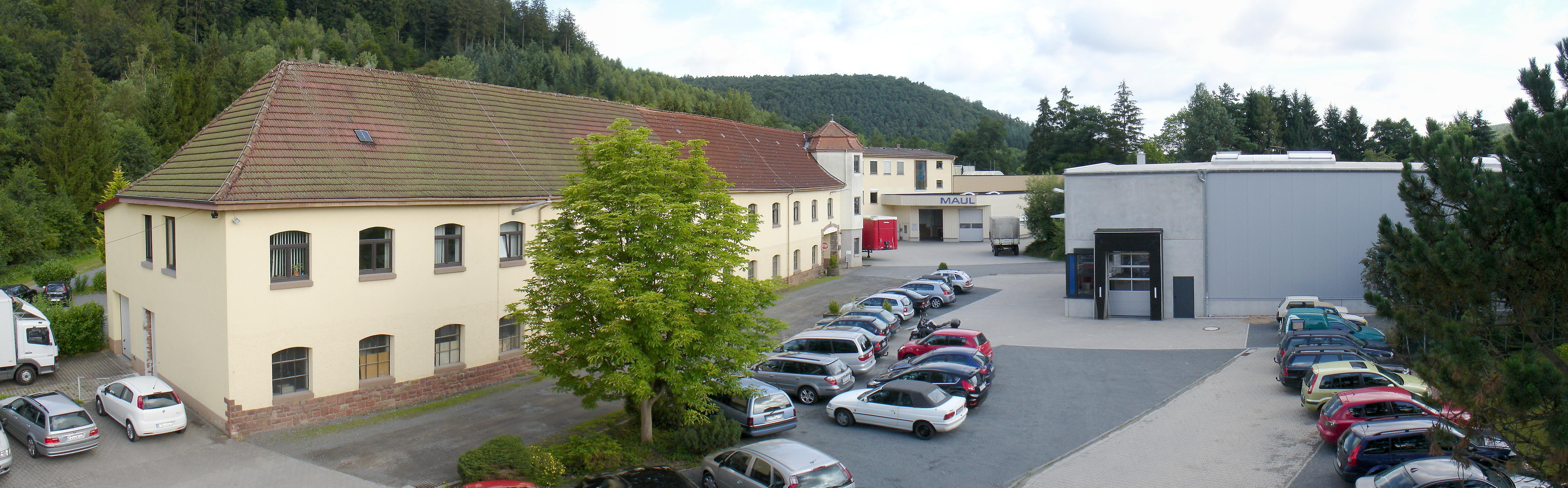 Firmengebäude der Firma Jakob Maul GmbH in Zell